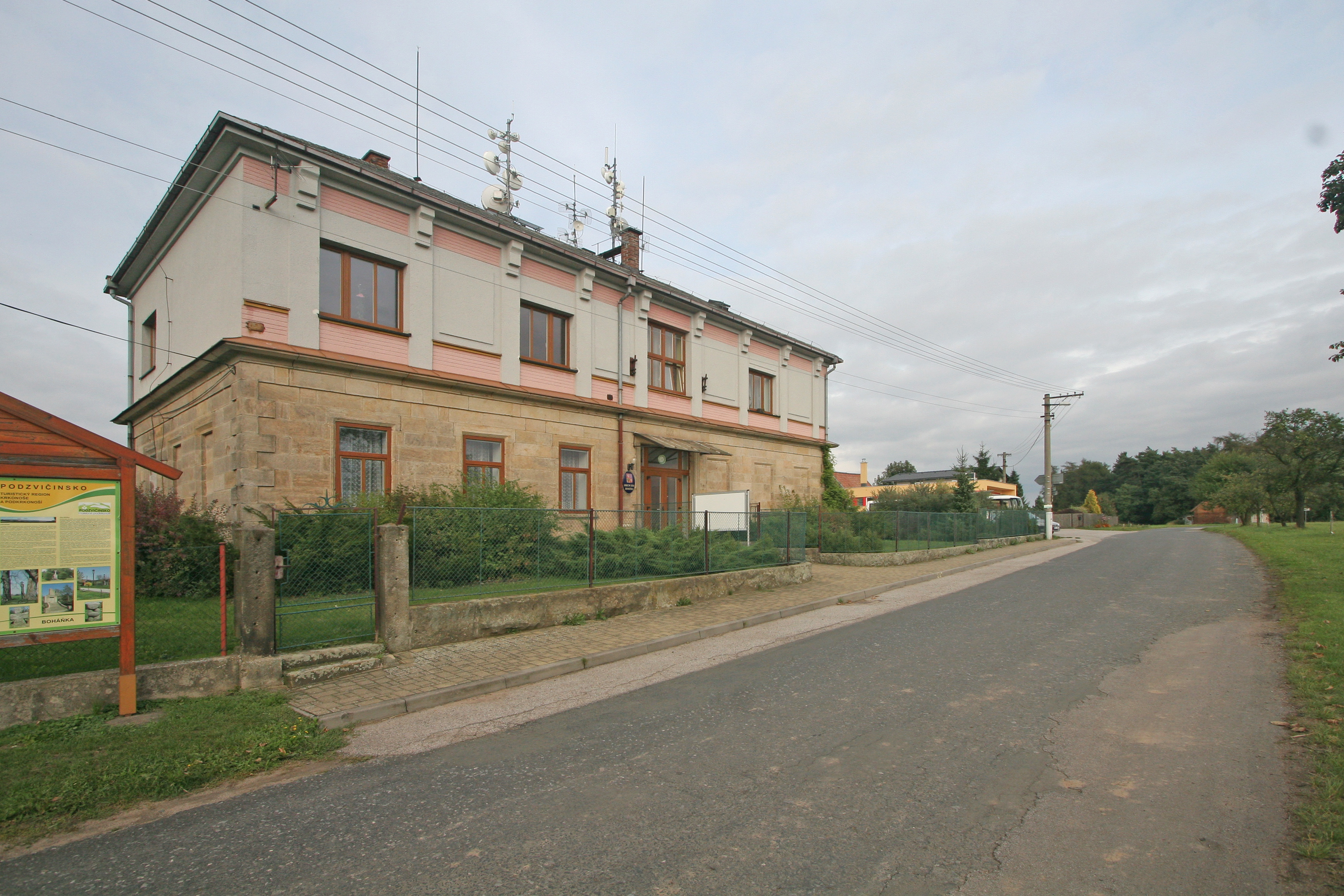 Boháňka obecní úřad